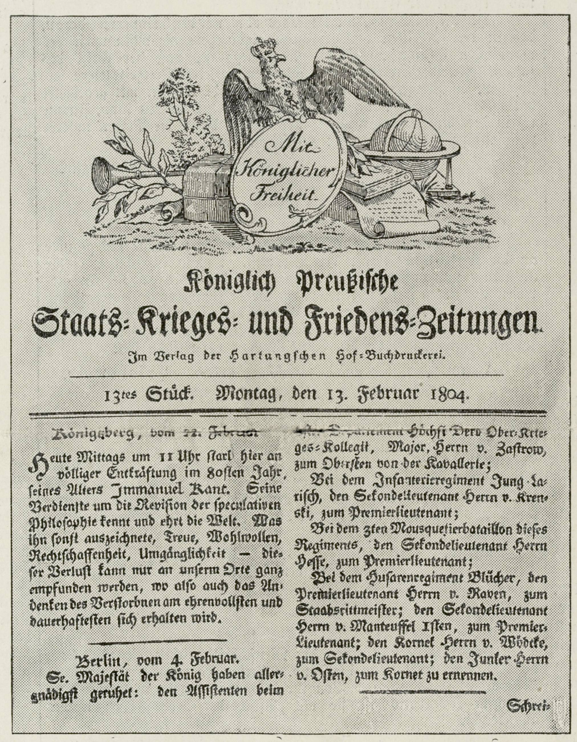 Todesanzeige Kants